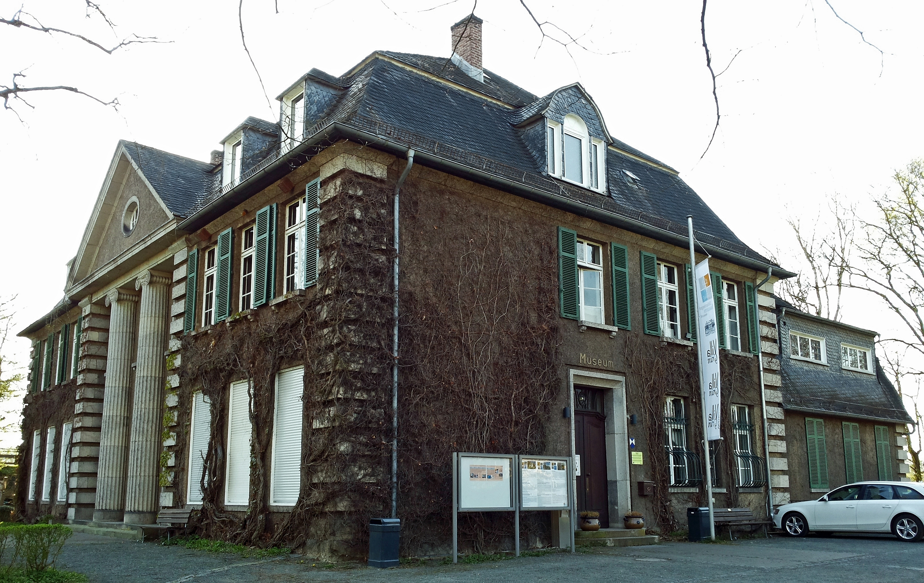 Dillenburg, denkmalgeschützte Grün'sche Villa, Schloßberg 3 (seit 1983 wirtschaftsgeschichtliches Museum)